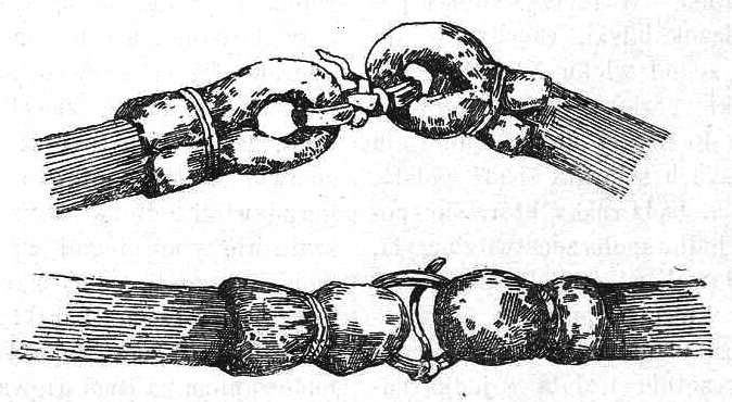 Cep, gązwa. – Spojenia dzierżaka z bijakiem w cepie polskim do młócenia zboża służącym.